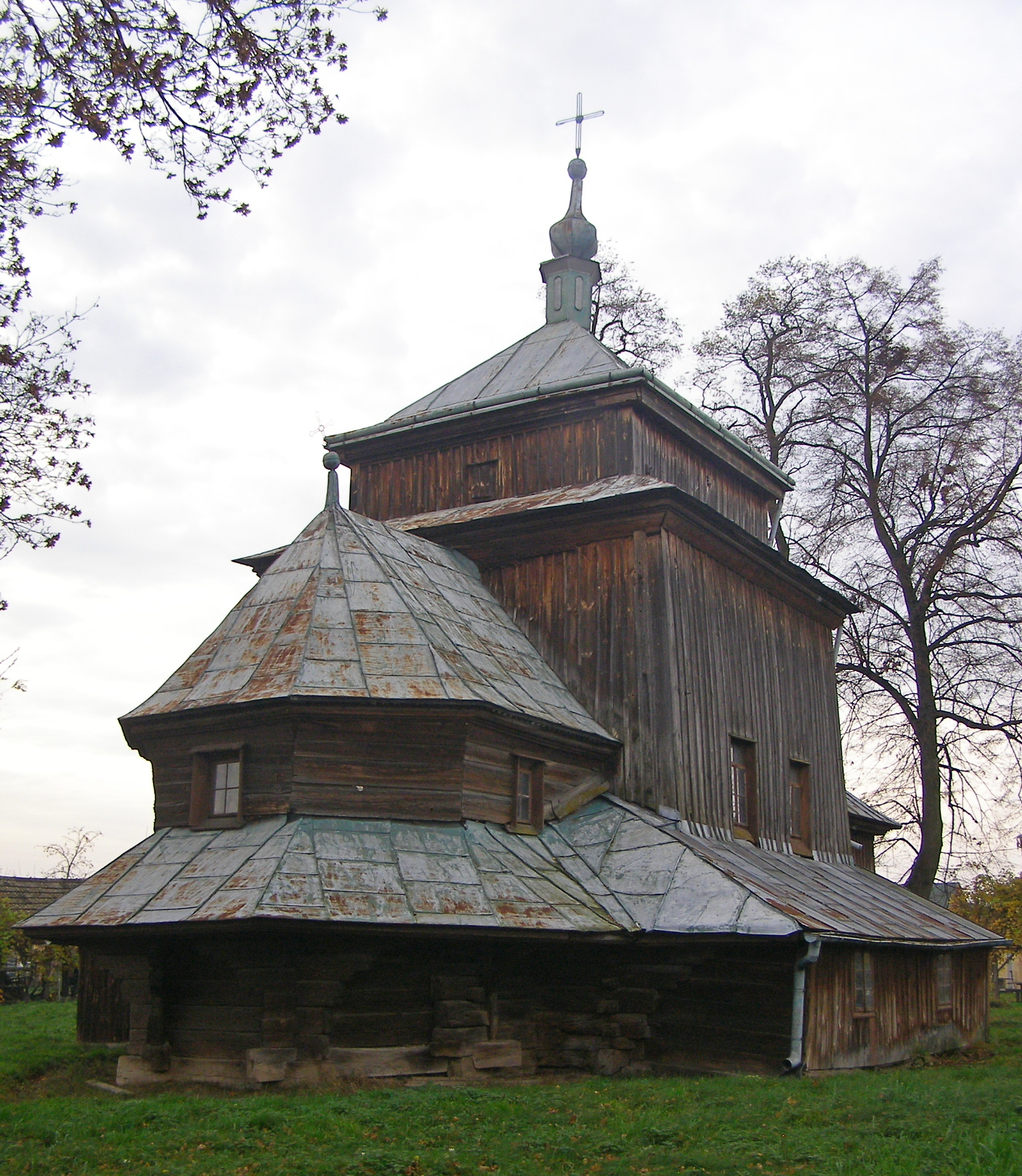 wieś Leżachów